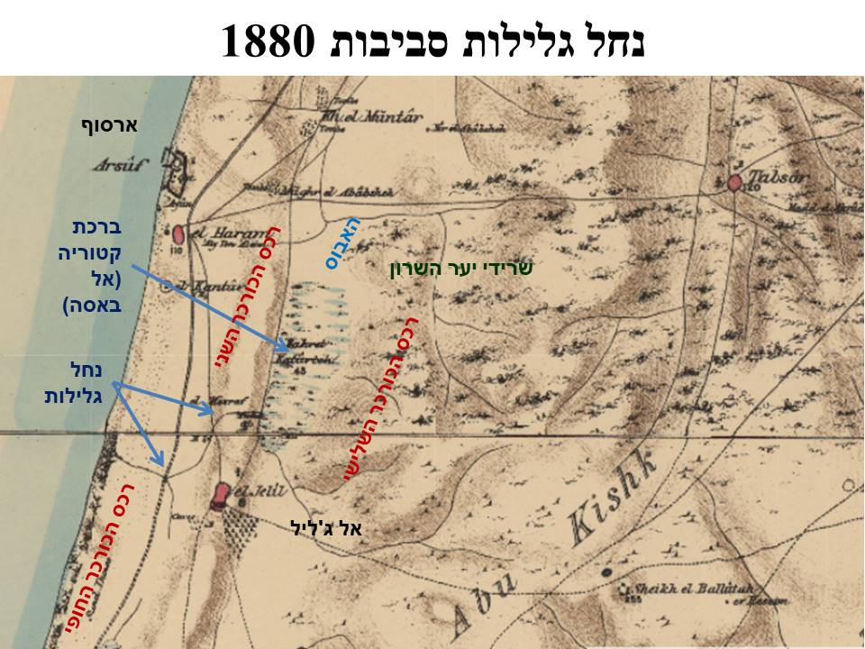 אזור נחל גלילות בסביבות 1880, כפי ששורטט במפת ה PEF